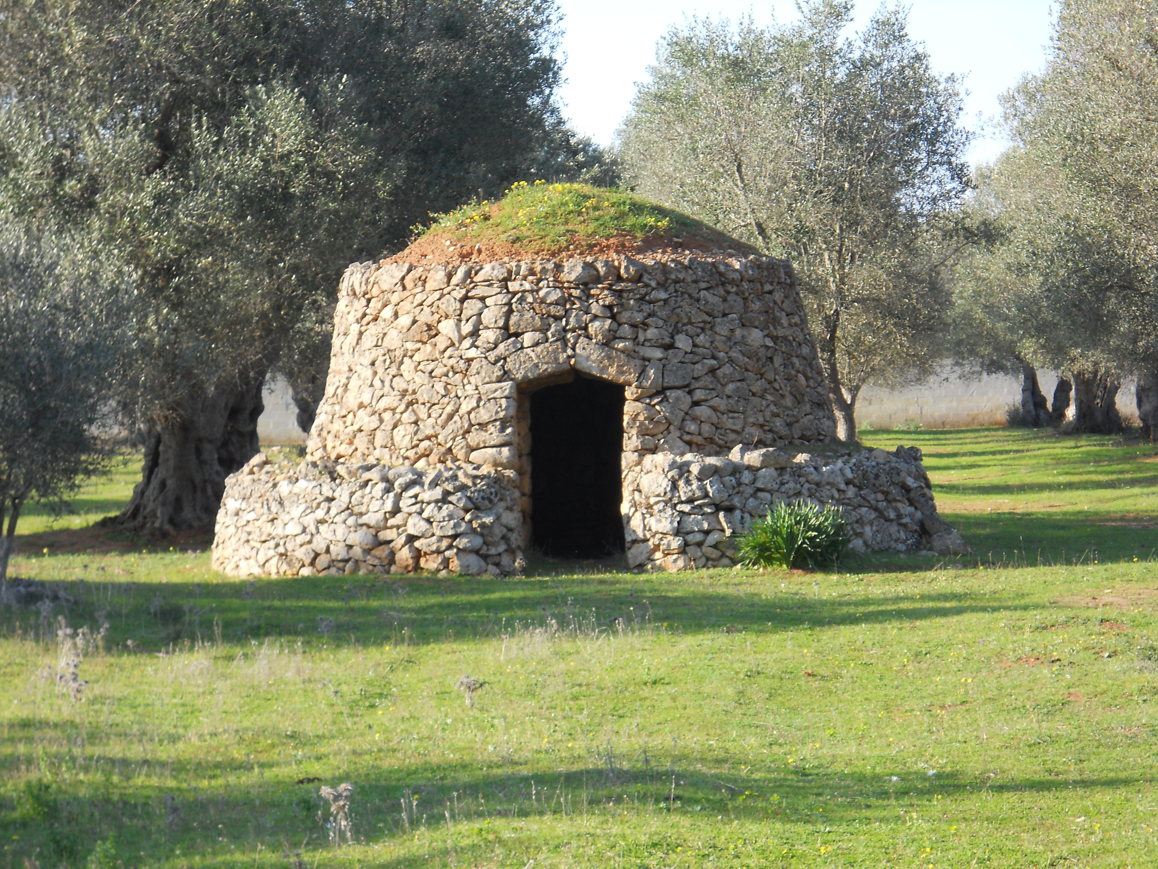 Furnieddhru caratteristico in località di Lequile(LE), Contrada Garibaldi